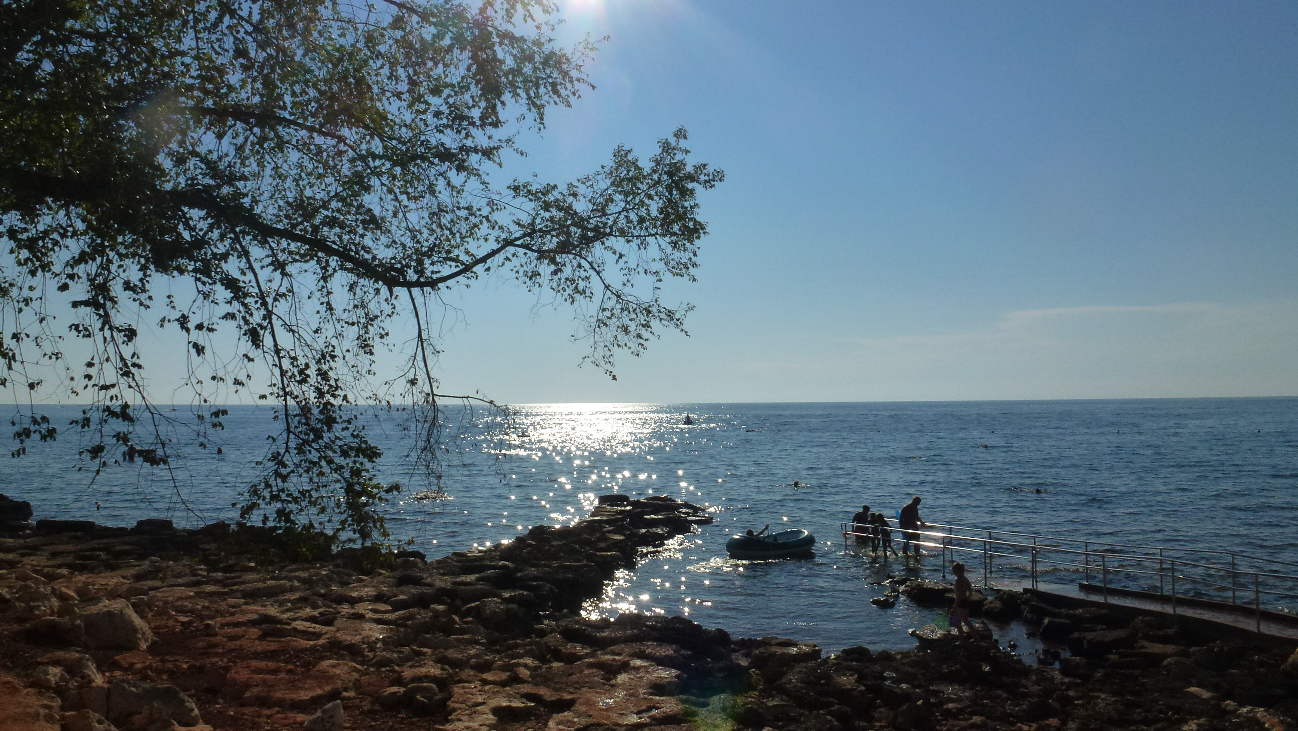 Karigador, Croatia